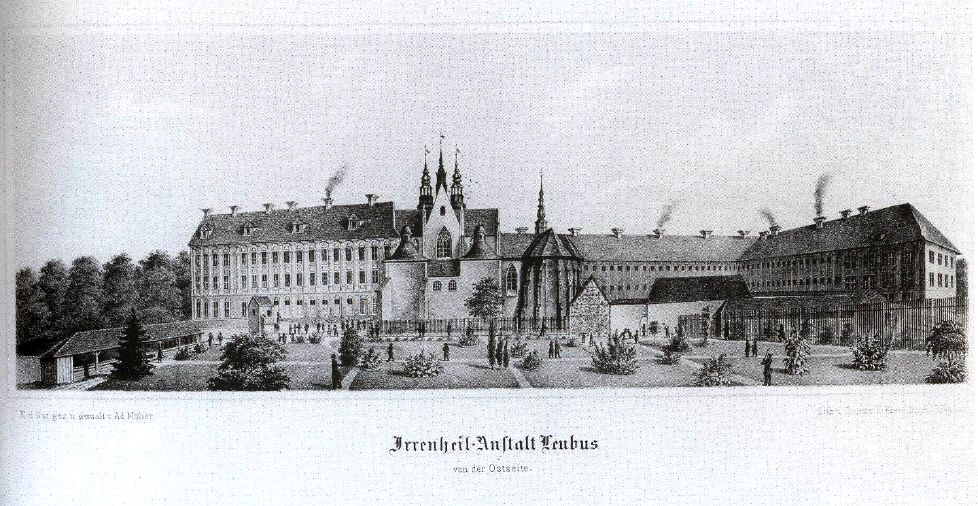 "Irrenheil-Anstalt Leubus von der Ostseite" de: Zeitgenössische Lithografie der, im ehemaligen Klosters Leubus eingerichteten, Psychiatrie. en: Lithografy of the Psychiatry in the former abbey of Lubiąż. pl: Litografia psychatrii w klasztoru w Lubiążu.